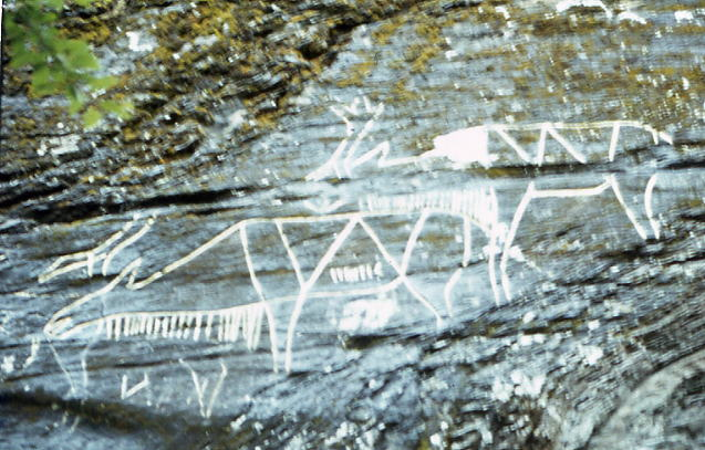 Gravure rupestre de Norvège (Narvik)